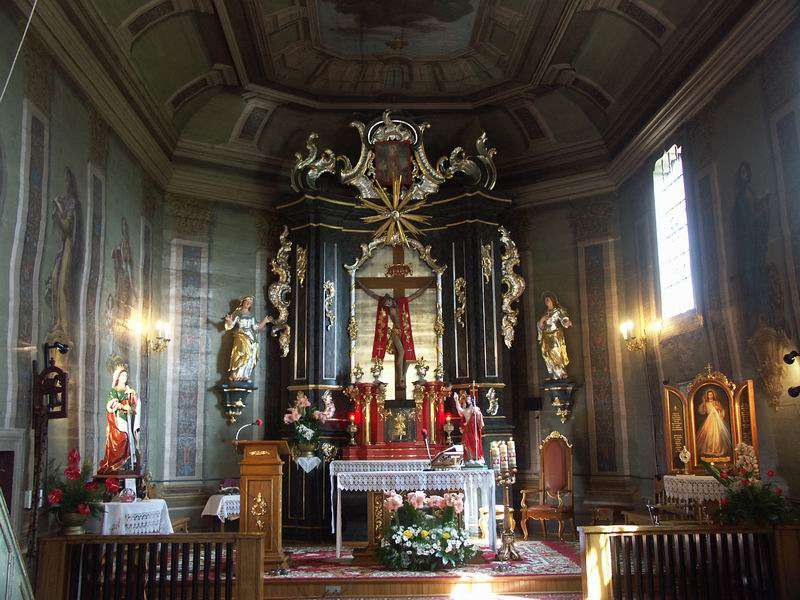 Ołtarz główny w kościele w Sławęcinie (powiat jasielski)